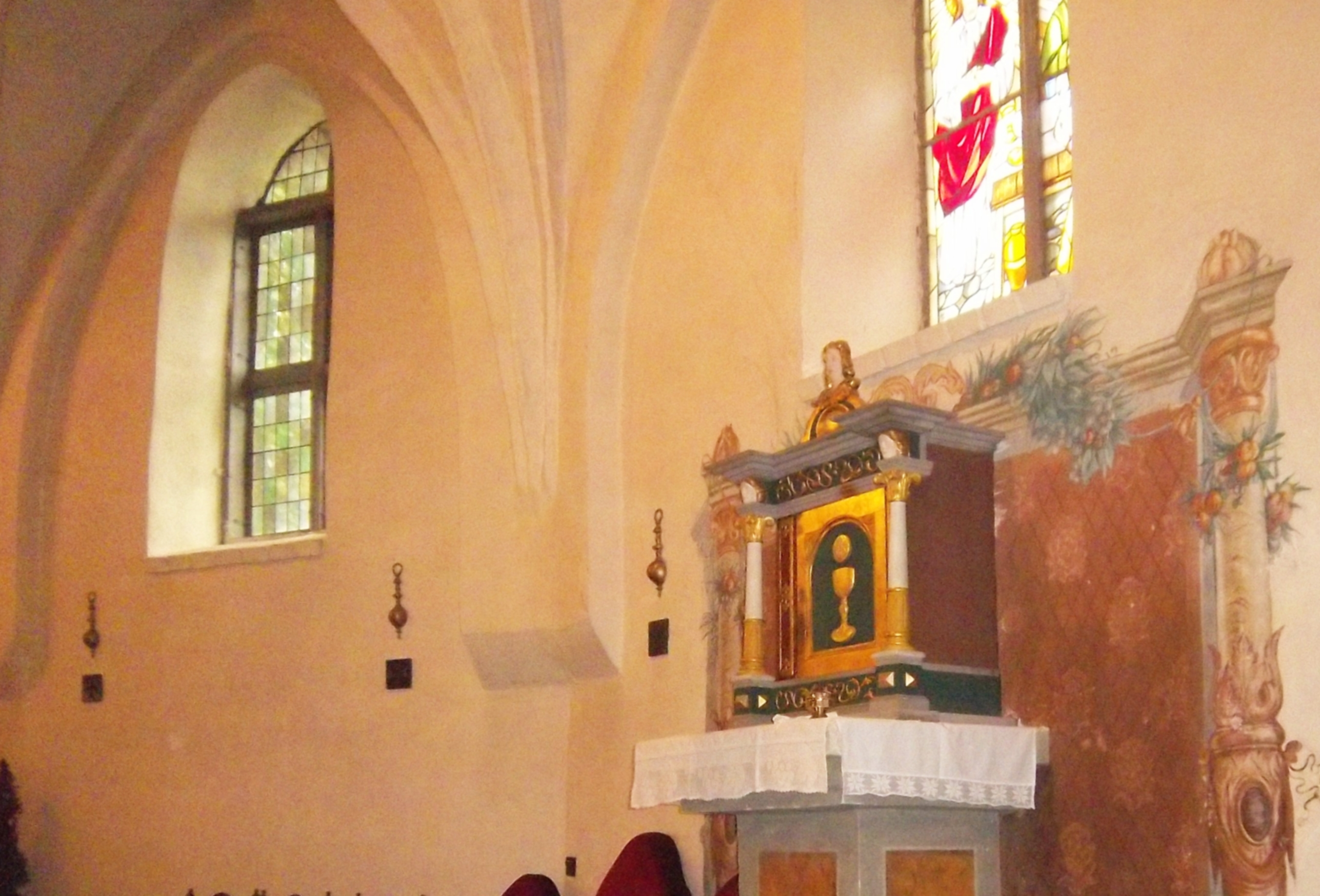 Kościół św. Gertrudy w Darłowie